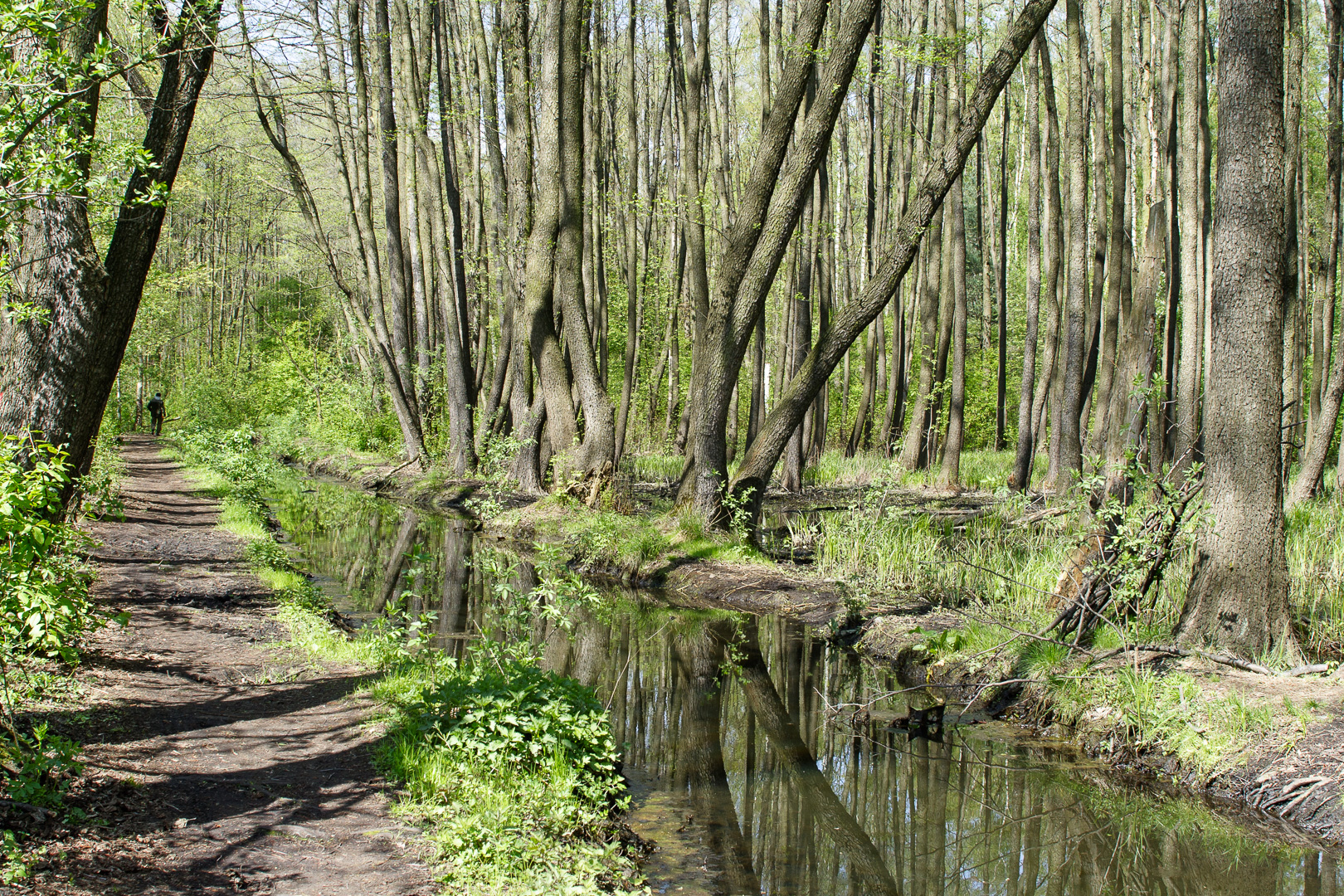 Olchy czarne w rezerwacie Olszynka Grochowska wzdłuż Kanału Kawęczyńskiego w pobliżu połączenia z Kanałem Rembertowskim oraz przepustu pod torami kolejowymi.